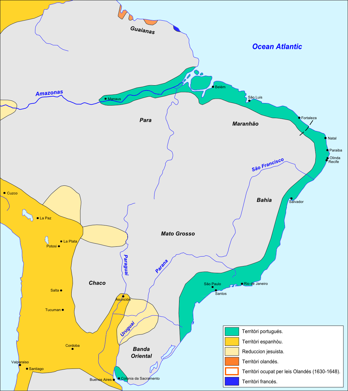 Colonizacion de Brazil vèrs 1690.